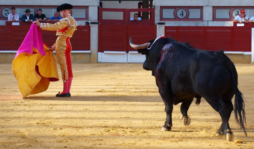 Javier Cortés esperando al toro de espaldas.